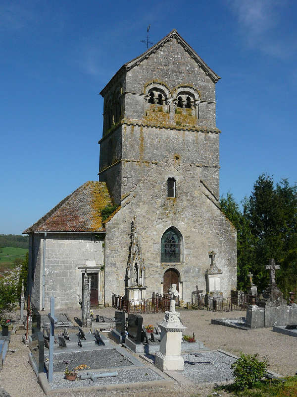 L'église romane de Médonville, dans les Vosges.